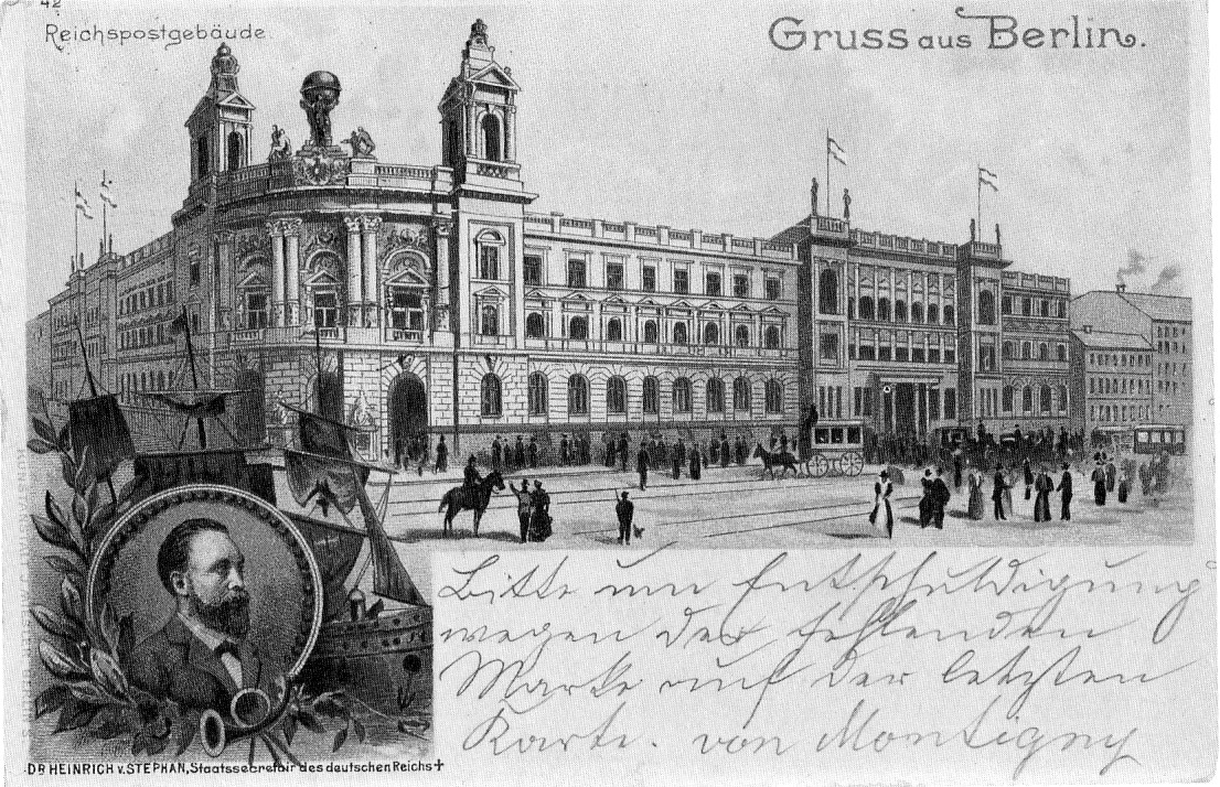 Historische Postkarte mit Ansicht des Reichspostgebäudes, des heutigen Museums für Kommunikation in Berlin.